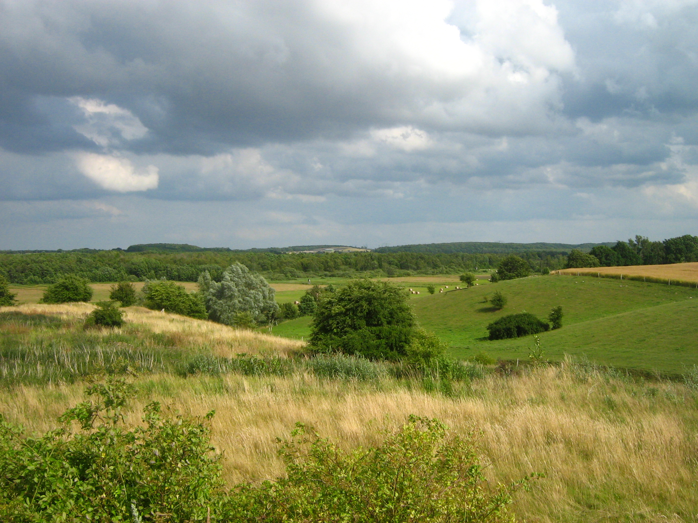 Blick von der westlichen Hangterrasse der Recknitz auf das Naturschutzgebiet Unteres Recknitztal (Landkreis Nordvorpommern im Mecklenburg-Vorpommern).